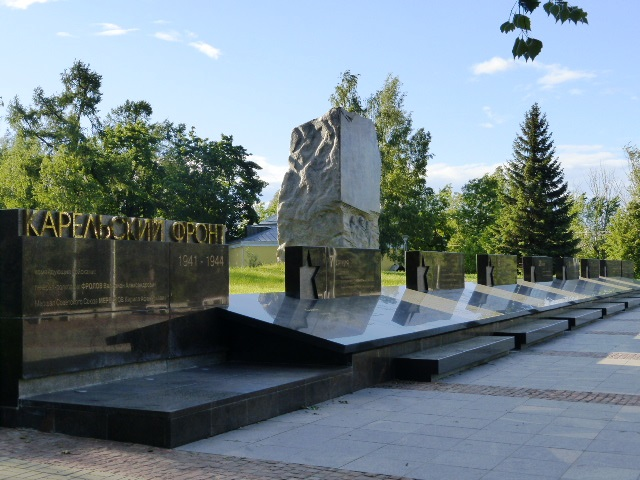 Мемориальный комплекс "Воинам, партизанам и подпольщикам Карельского фронта". Открыт 8 мая 2015 года на пересечении улиц Гоголя и Энгельса в Петрозаводске, арх. А.А.Савельев, худ.В.П.Лобанов).